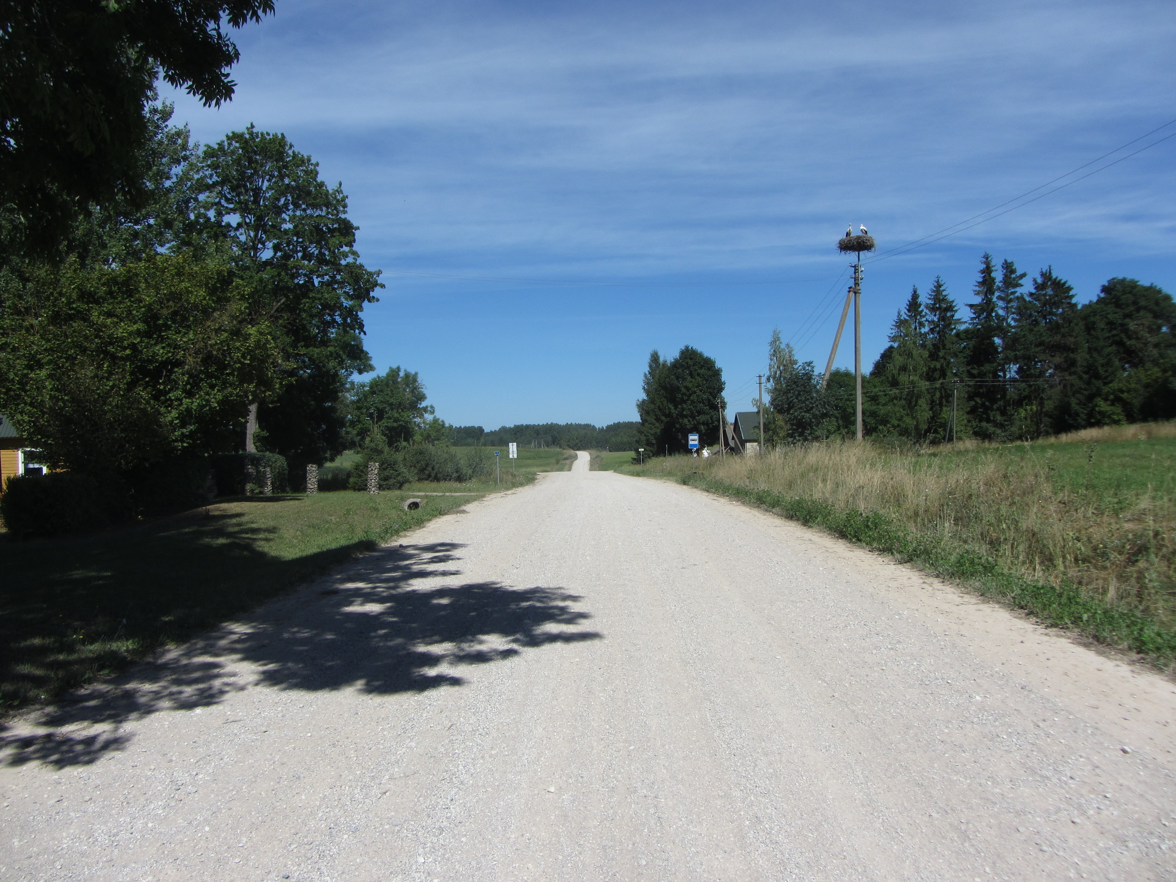 Norvaišiai, Lithuania